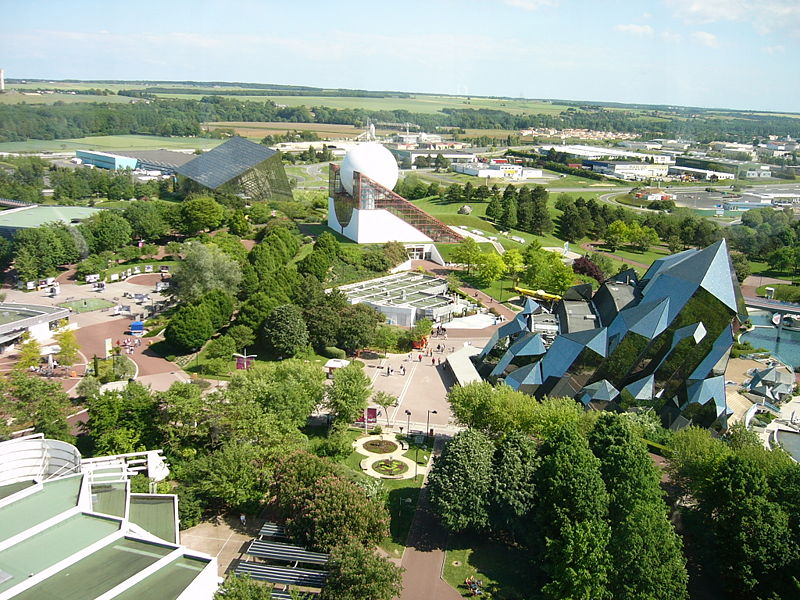 Le parc du futuroscope vu depuis la tour gyroscopique